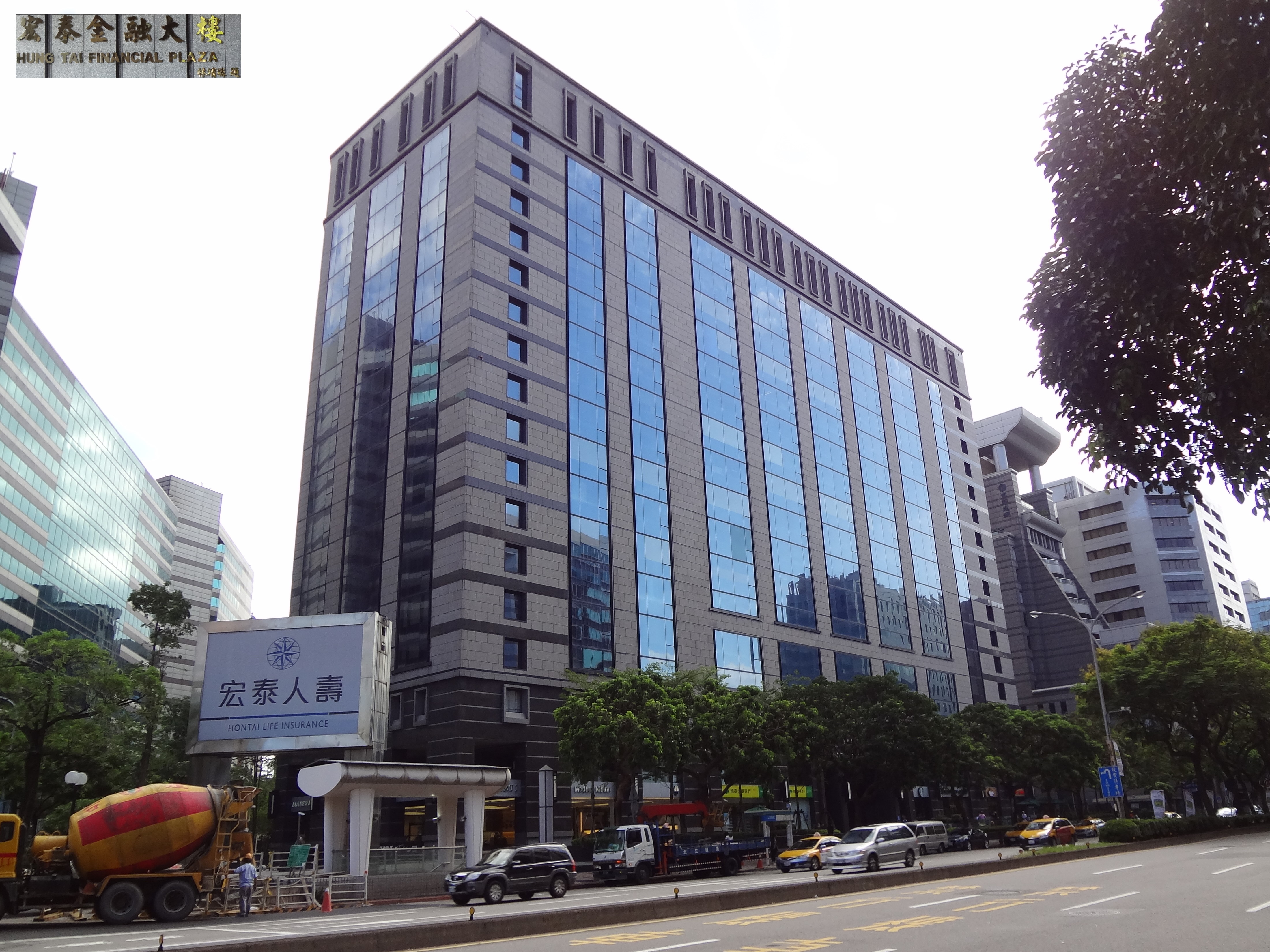 宏泰金融大樓，位於臺北市松山區民生東路三段156、158號。156號4樓為宏泰人壽總部所在地。